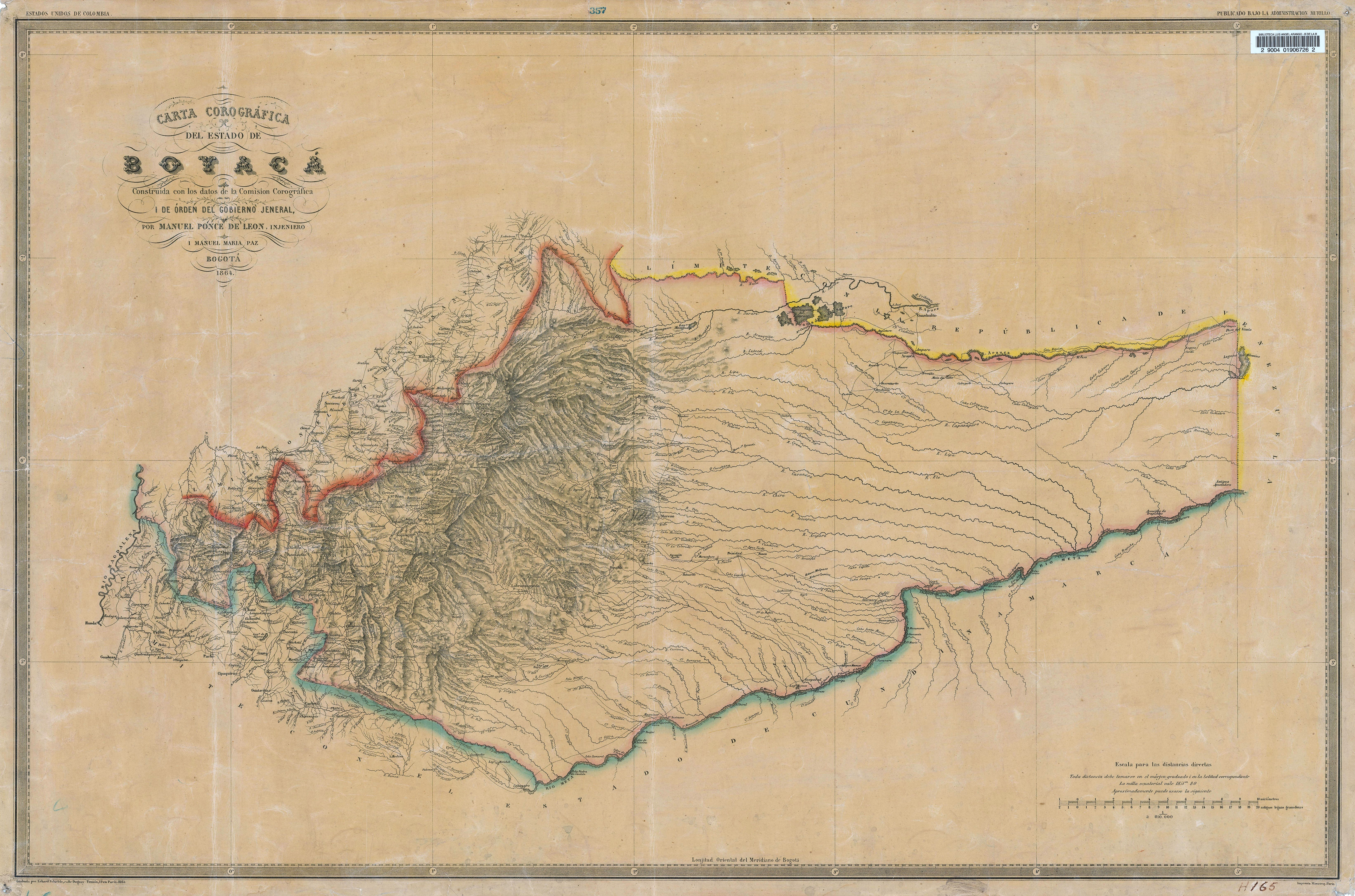 Carta Corográfica del Estado Soberano de Boyacá. Tomado del "Atlas de los Estados Unidos de Colombia, antigua Nueva Granada", 1865.